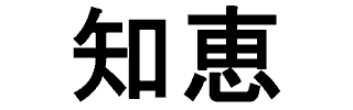 Kanji de la palabra "Sabiduría"